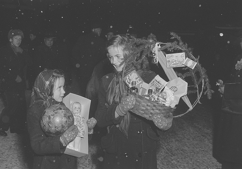 Original image description from the Deutsche Fotothek Kinder mit Geschenken